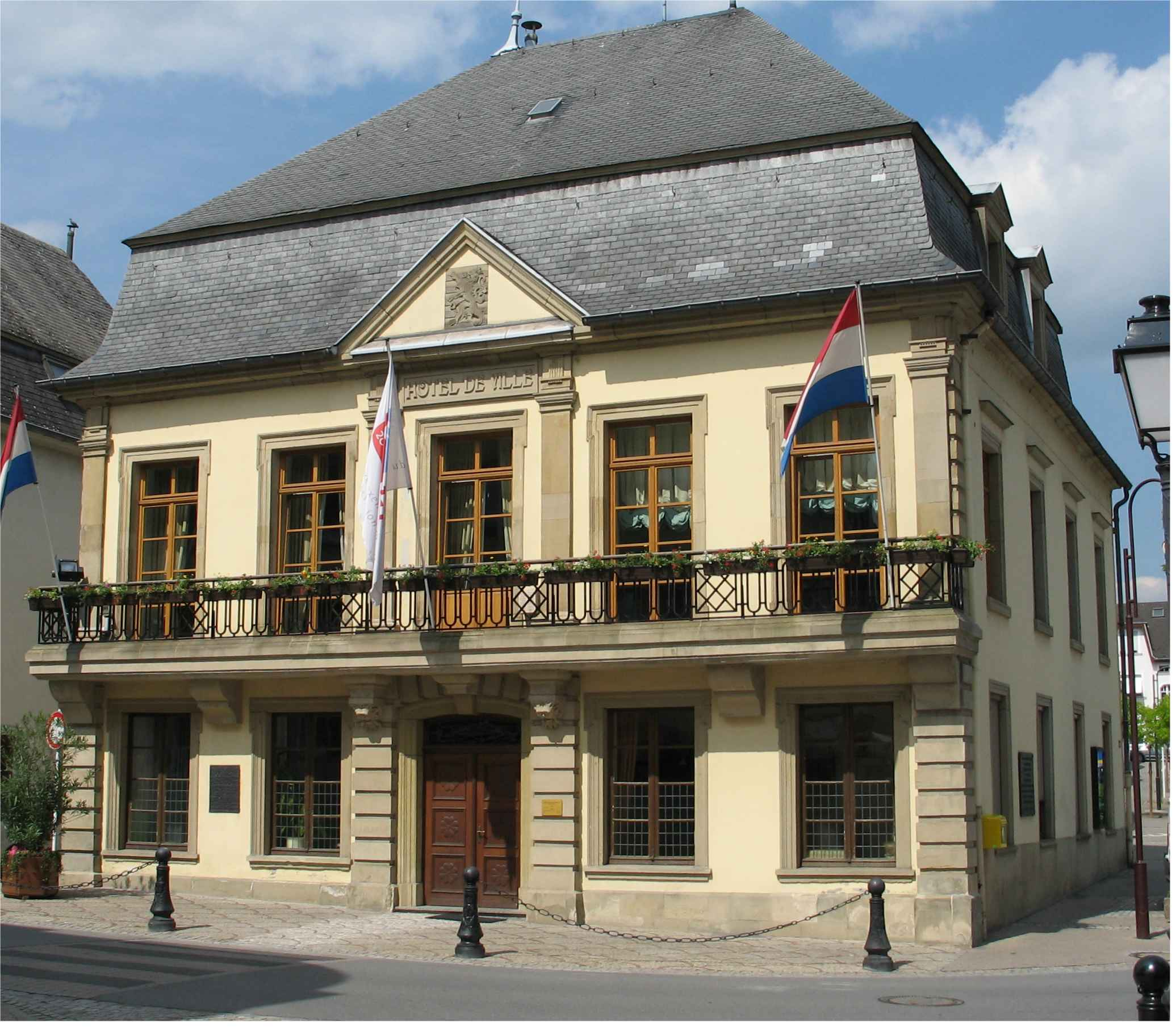 Fréier Gemeng Gréiwemaacher. Kategorie:Gemeng Gréiwemaacher